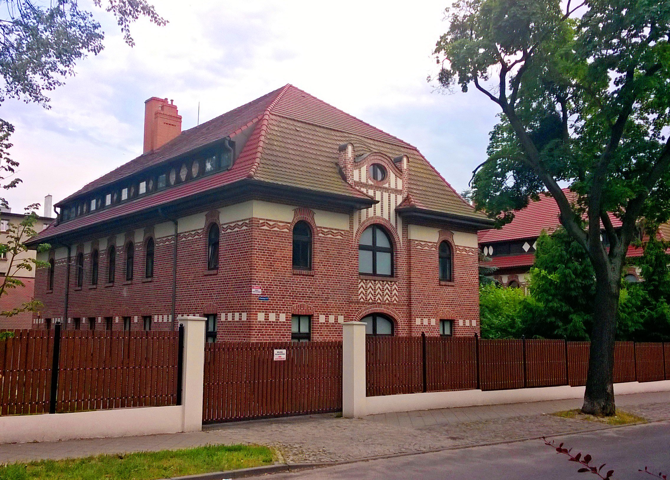 Budynek przy ul. Słowackiego 45 w Toruniu